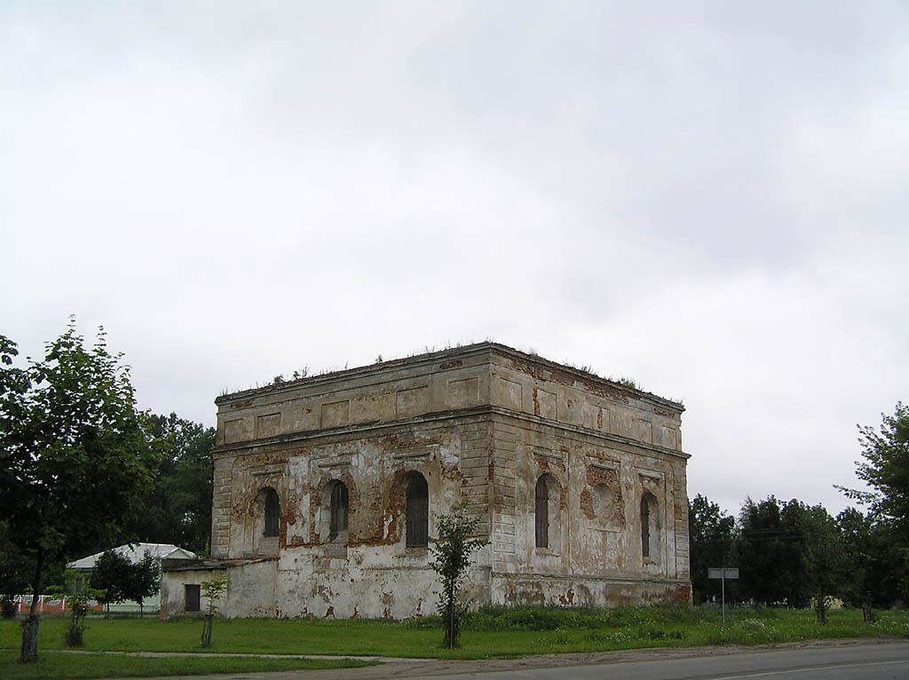 Беларуская (тарашкевіца): Сынагога ў Быхаве